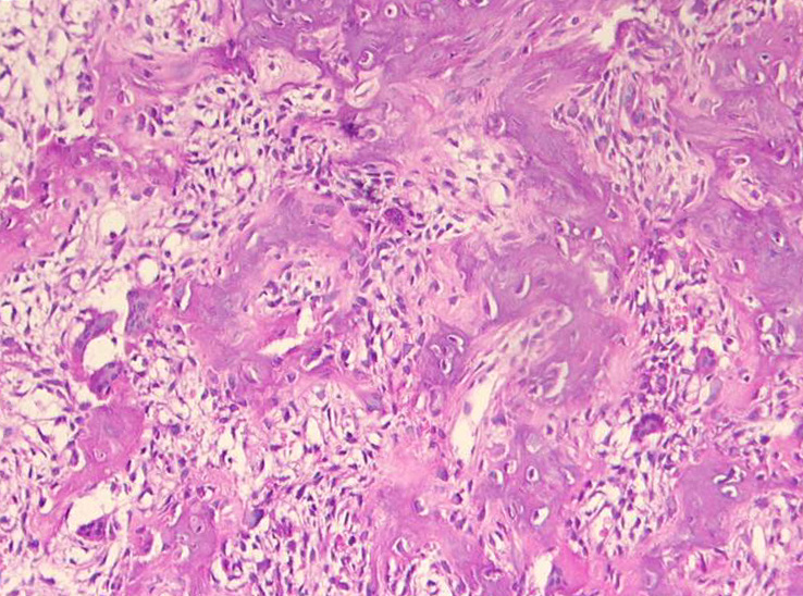 Osteoidosteom: Histologie.